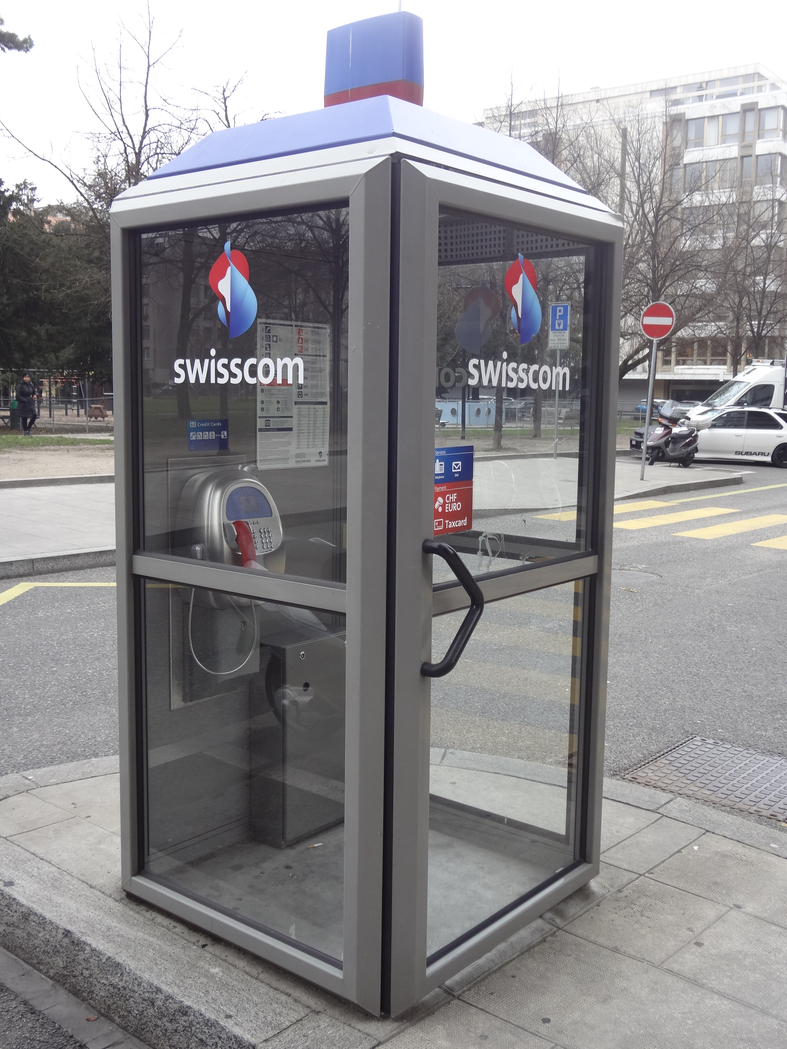 Cabine téléphonique à la rue des Ronzades, Acacias, Genève.